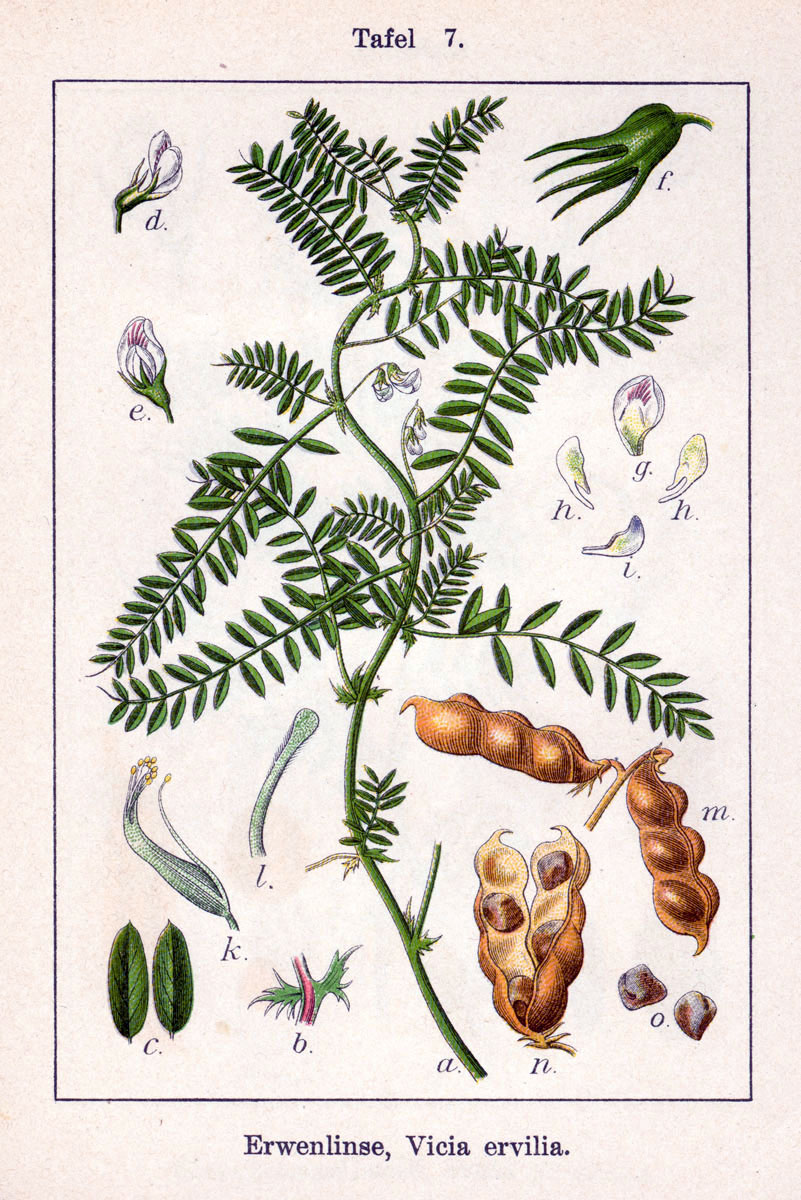 Vicia ervilia (L.) Willd. Original Description Erwenlinse, Vicia ervilia